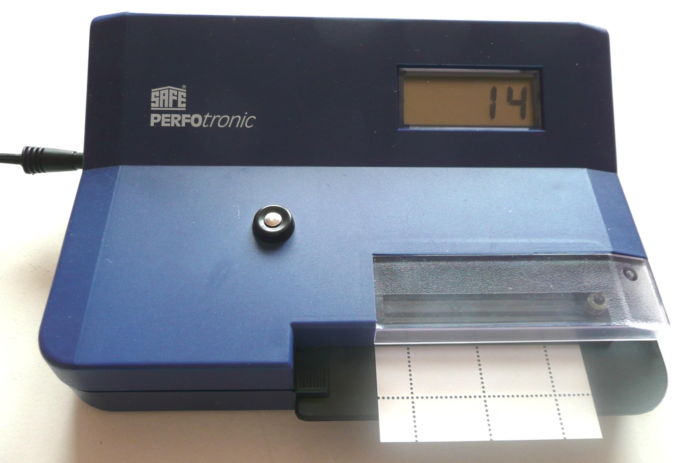 Perfotronic